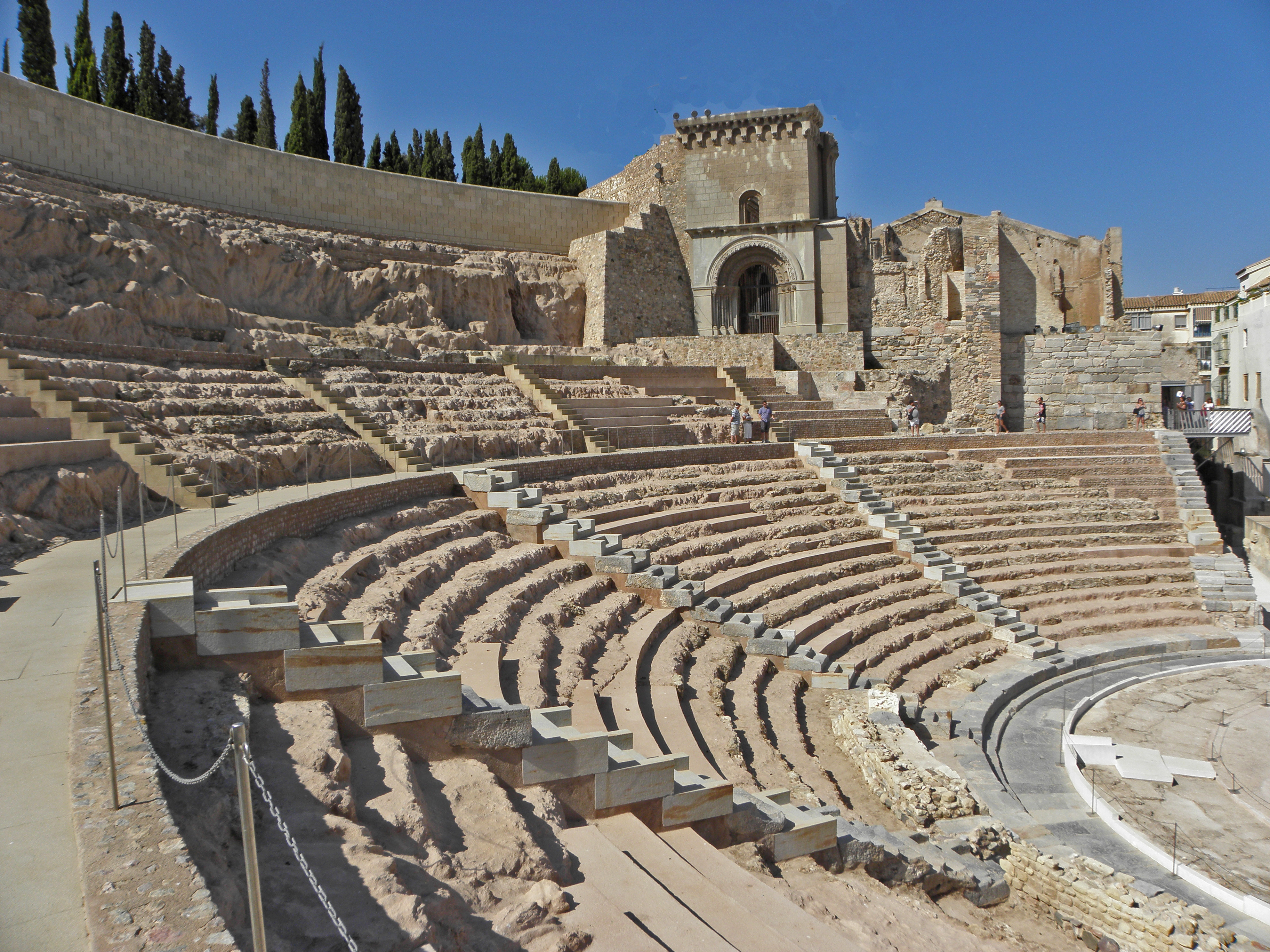 Teatro Romano de Cartagena